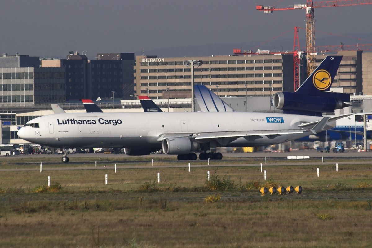 Lufthansa Cargo MD-11 D-ALCB